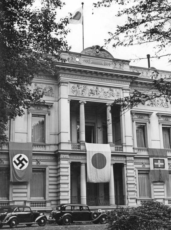 Berlin, Japanische Botschaft ADN-ZB Berlin 1940: Im faschistischen Deutschland. Die japanische Botschaft in der Tiergartenstraße. 8309-40 [Berlin.- Japanische Botschaft in der Tiergartenstraße mit Hakenkreuzflagge, Flagge des Kaiserreichs Japan und Italien]